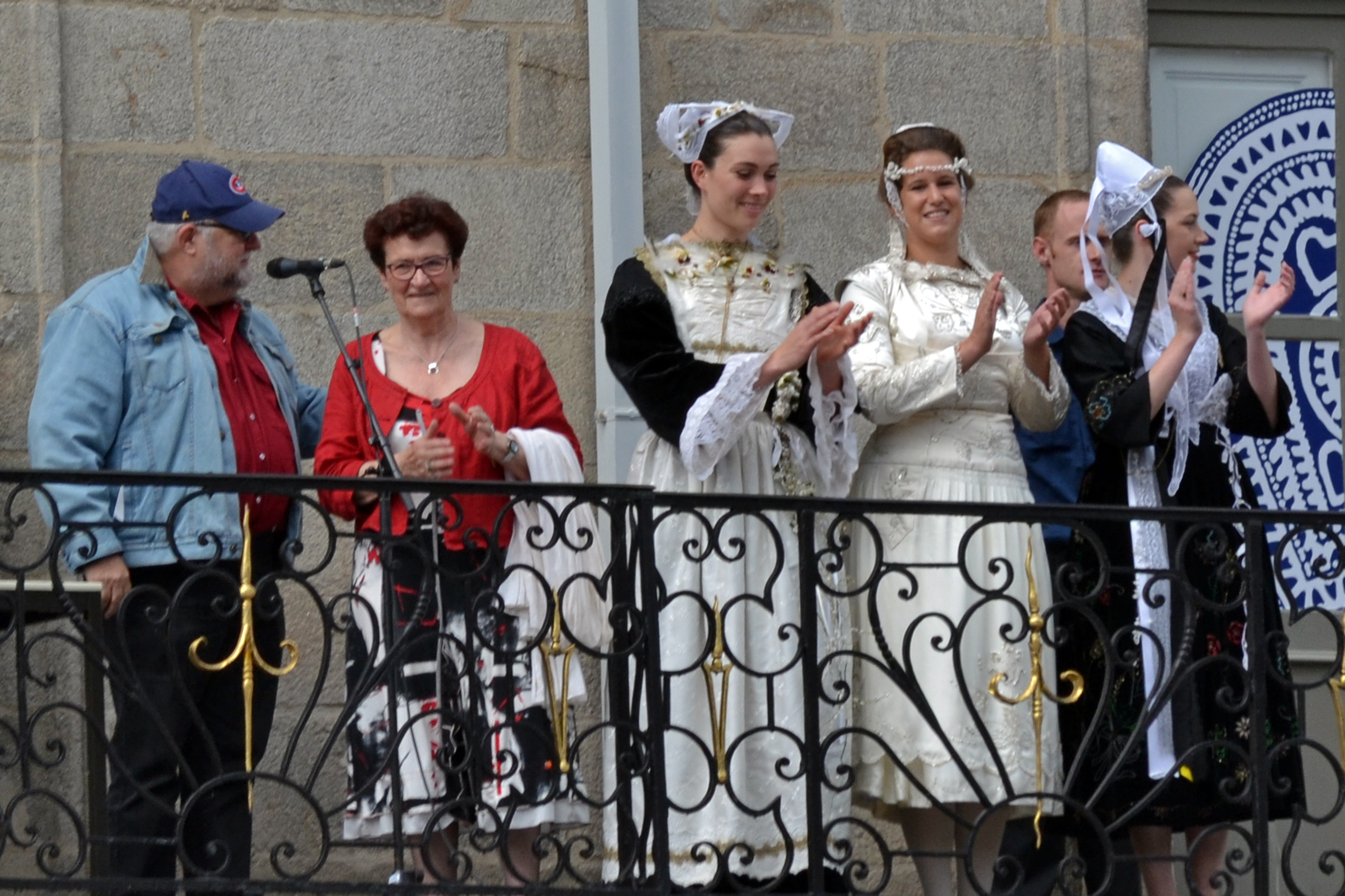 La chanteuse Louise Ebrel accompagnée des "finalistes" de l'élection 2012 et d'Yvon Etienne lors de l'élection de la Reine de Cornouaille 2013 à Quimper le 28 juillet.